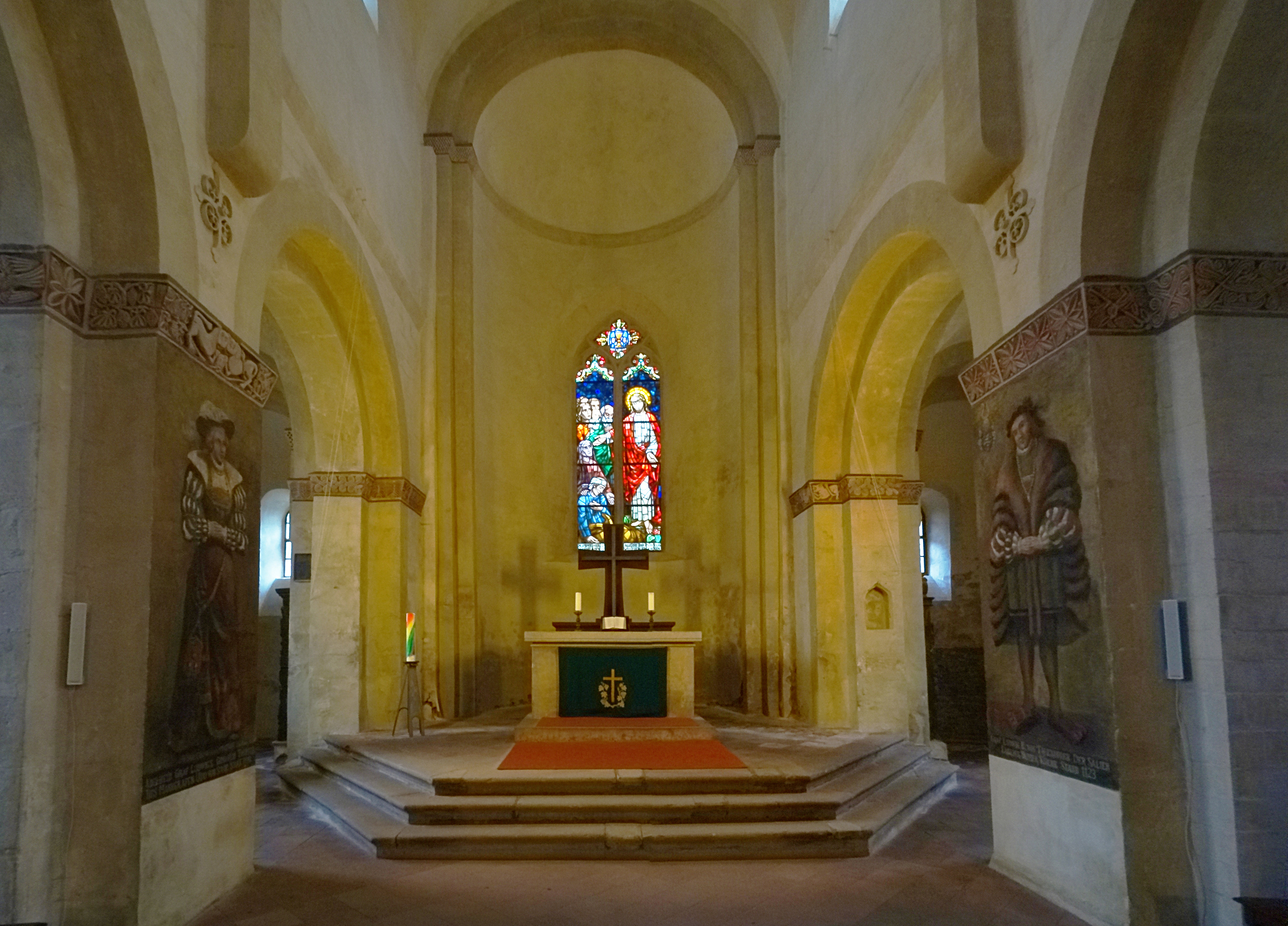 Sankt Ulrici (Sangerhausen), Altarraum